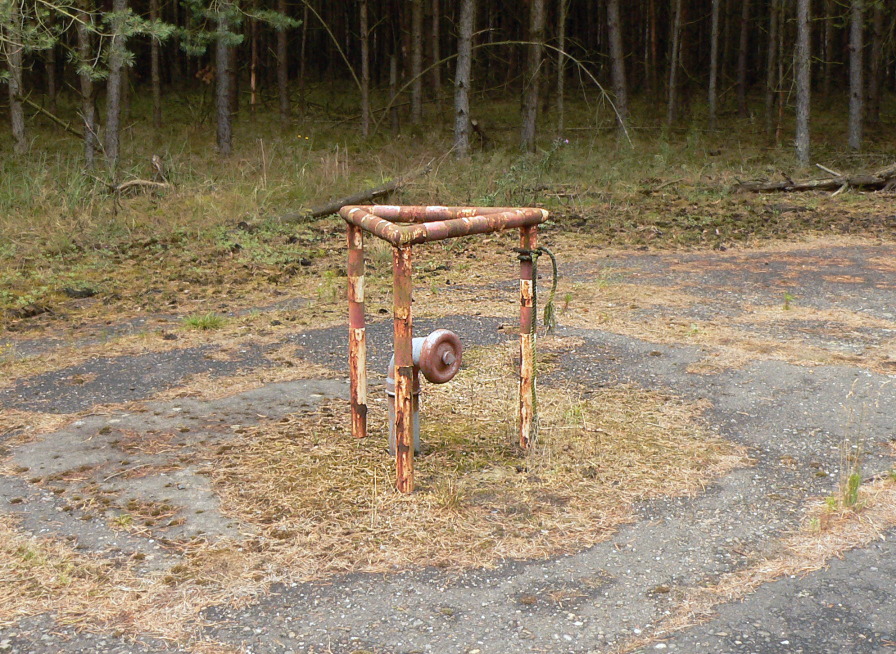 Löschwasserbrunnen auf dem Areal der Republik Freies Wendland, danach aspaltierte Tiefbohrstelle 1004, heute Löschwasserbrunnen der örtlichen Feuerwehr